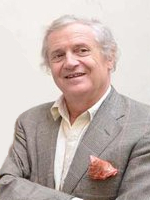 version croppée de "File:Livre audio.png", Pascal Kané assiste au Grand Prix du Livre Audio 2011.